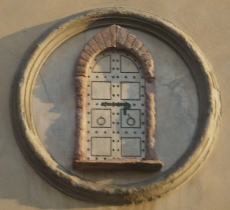 Stemma_arte_della_seta (from spedale degli innocenti) in Florence, Italy